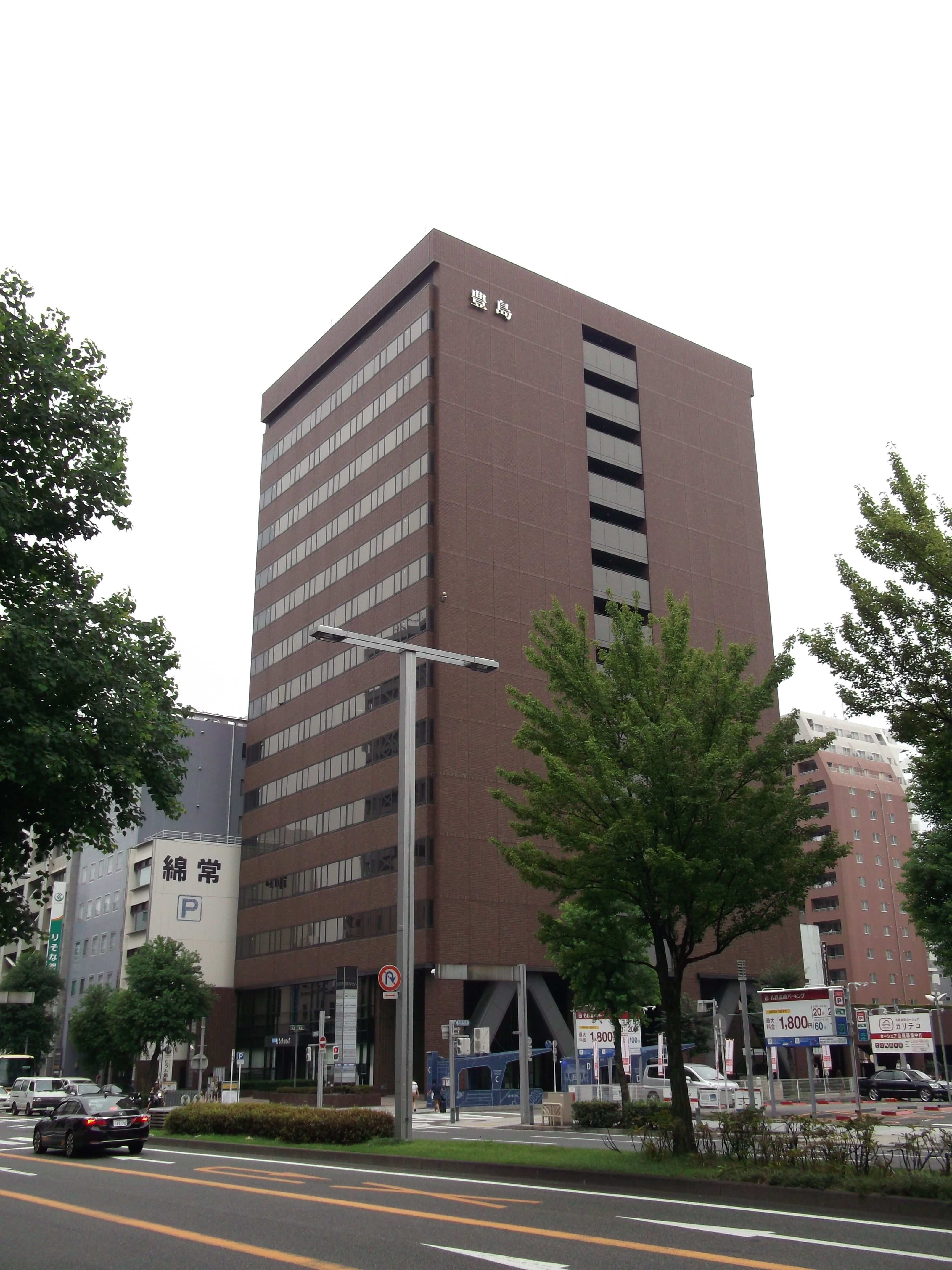 名古屋市中区錦二丁目の豊島ビルを南側公道東側より撮影